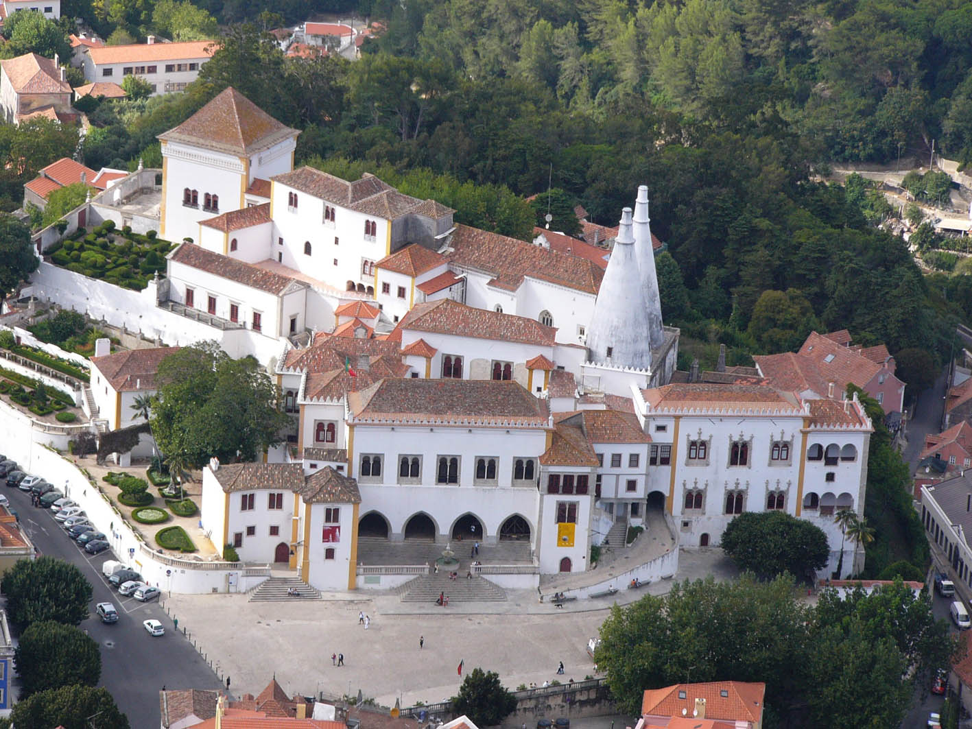 Sintra National Palace, Portugal